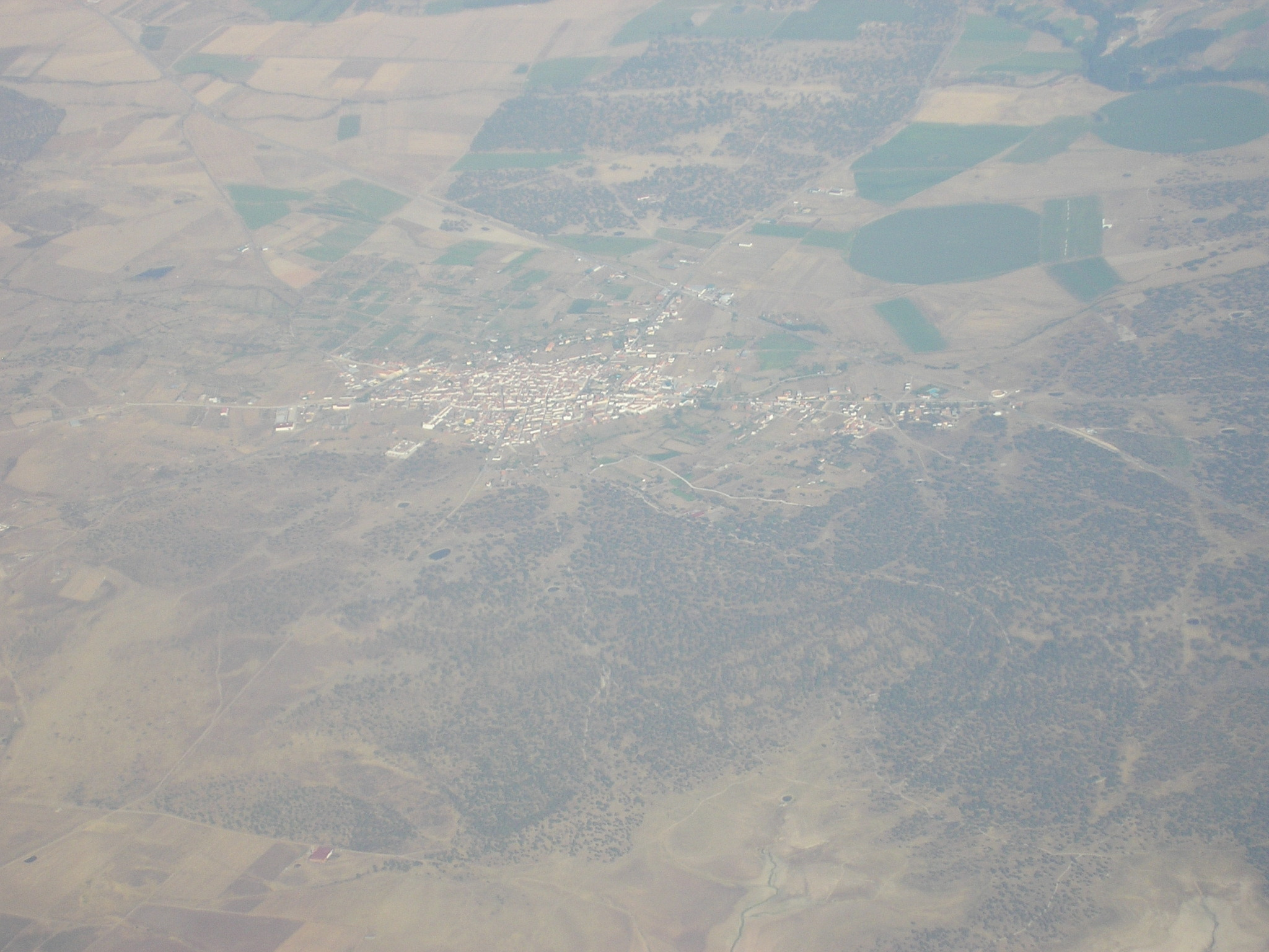 Población de Zarza de Granadilla tomada el día 18 de Julio de 2006 desde un avión con trayecto Lanzarote - Salamanca (Matacán).